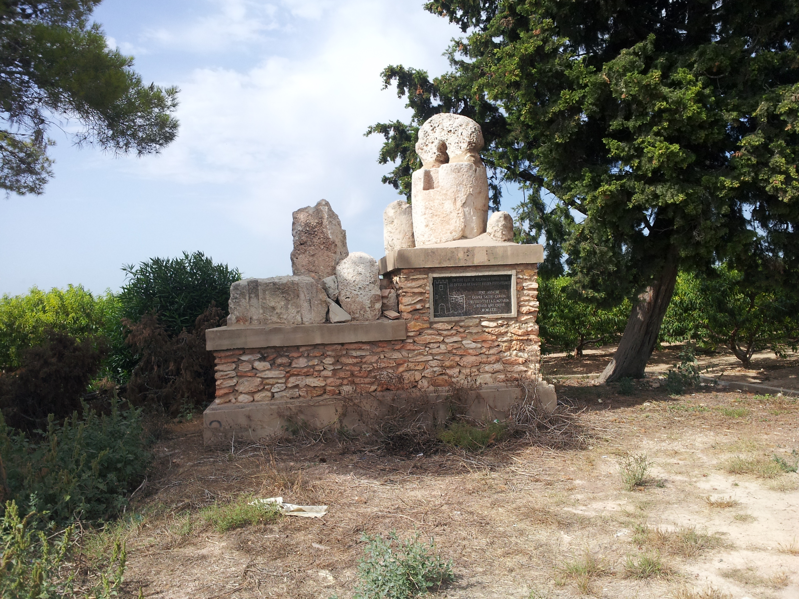 Restes de la Torre, al terme de Sollana